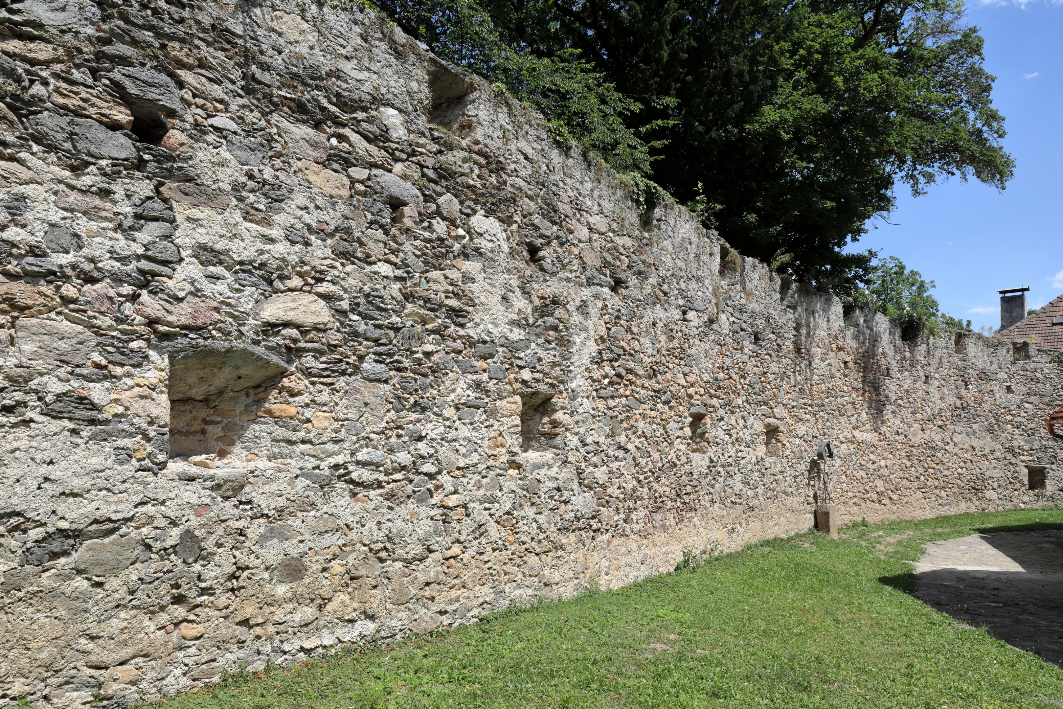 Nördliche mittelalterliche Wehrmauer des Kirchhofes in Pottschach, ein Ortsteil der niederösterreichischen Stadtgemeinde Ternitz. Die Schießluken wurden zugemauert. Sehr gut sichtbar sind die Aussparungen für den hölzenen Wehrgang, der 1970 demontiert wurde.